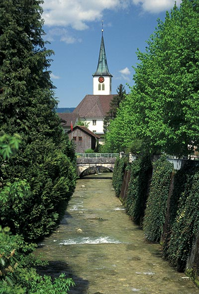 Die Lüssel bei Erschwil